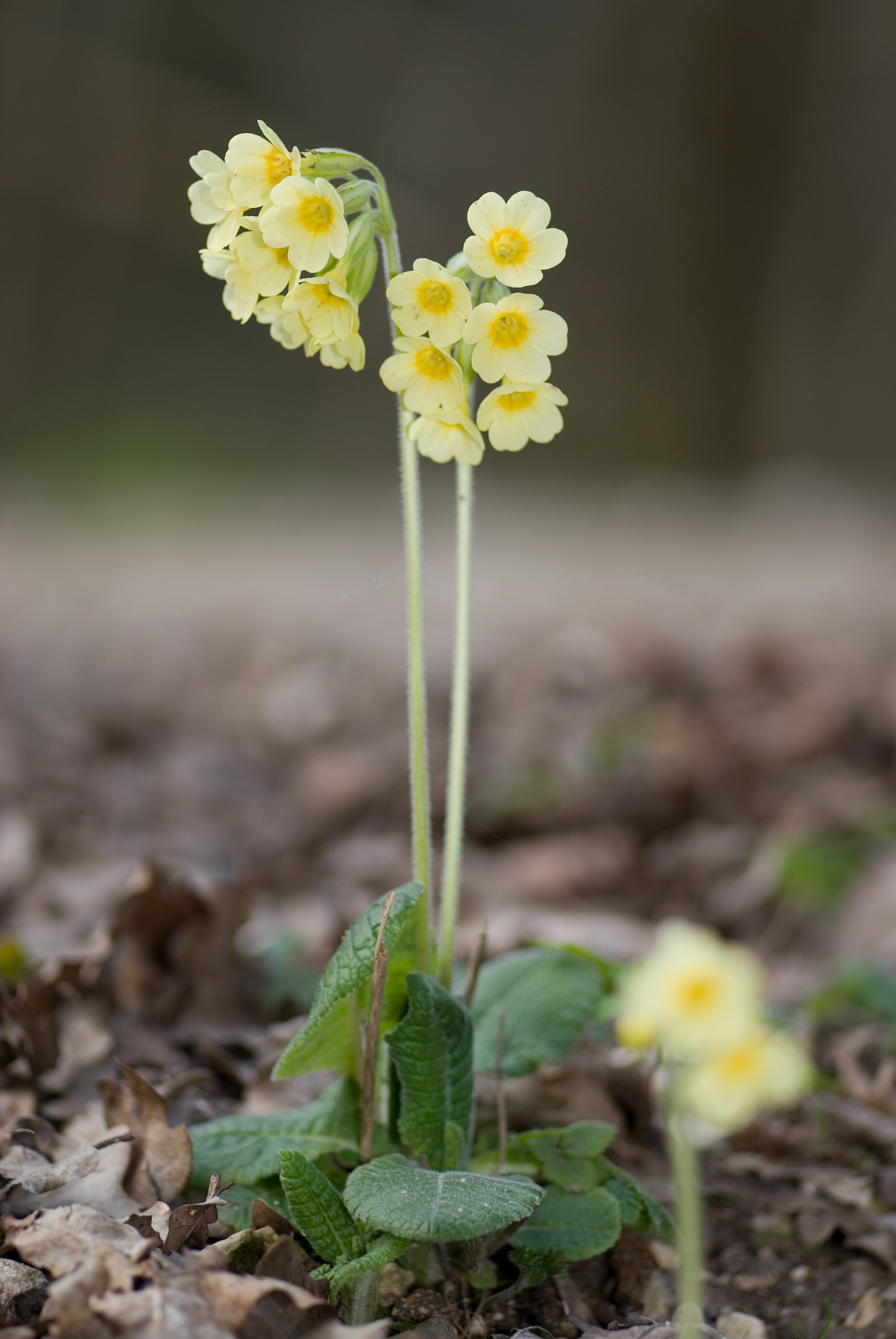 Primula elatior en Meuse (Forêt domaniale de Koeur la Grande).